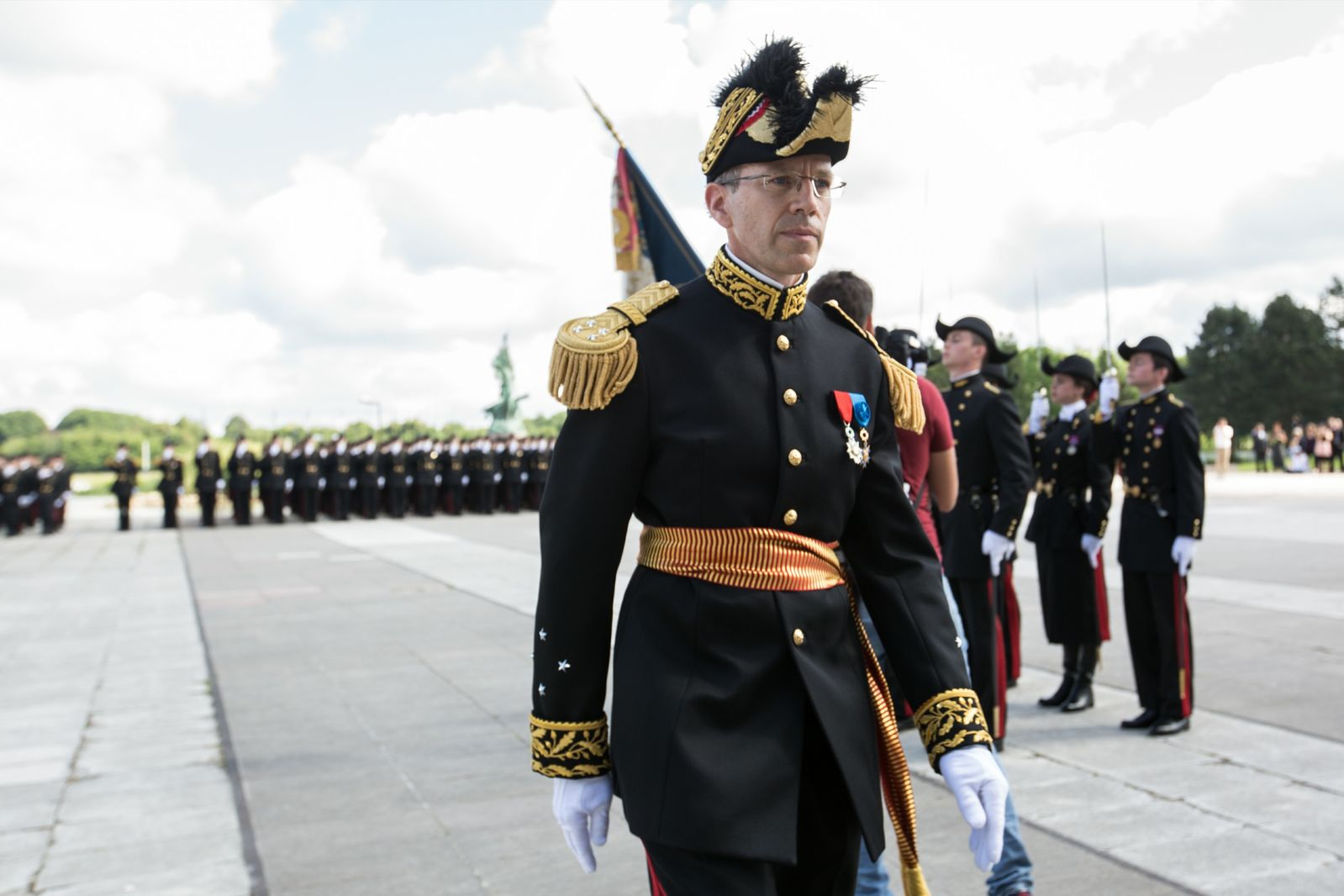 Photographie : Jérémy Barande L'ingénieur général François Bouchet en Grand Uniforme à l'occasion de la Passation de drapeau de l'École polytechnique, le 2 juin 2018, Cour Vaneau.